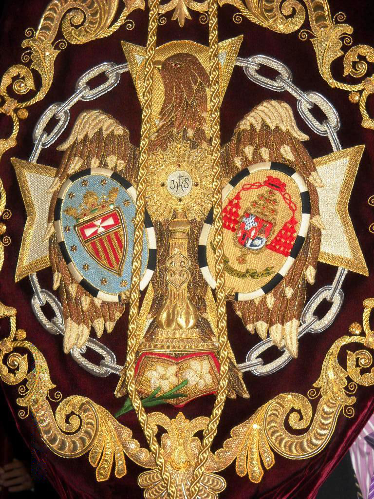 Escudo que aparece en el bacalao de la Hermandad